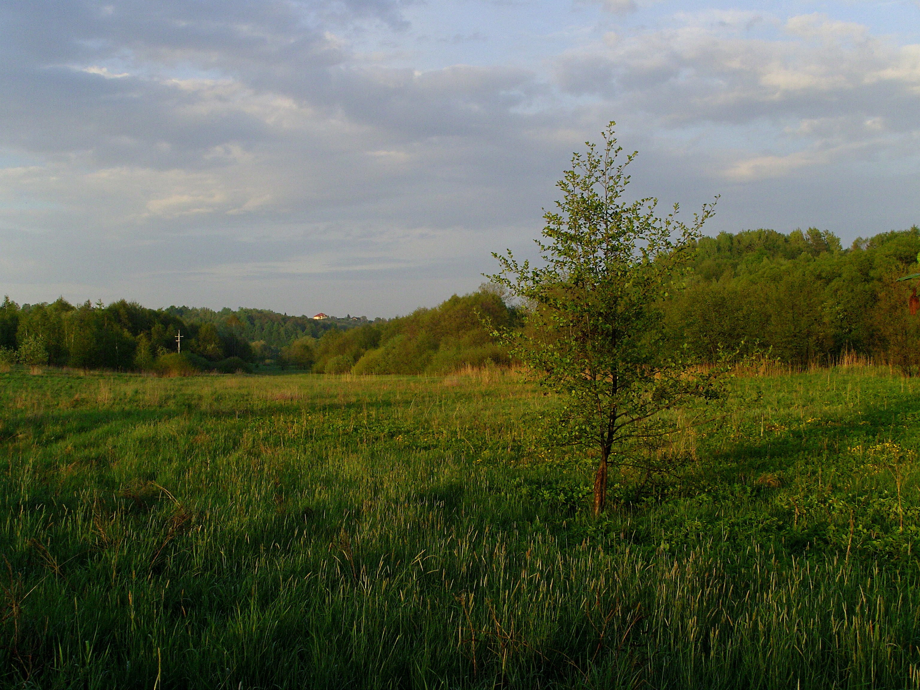 Łąki nad Młynówką, objęte prawną ochroną w ramach projektu Natura 2000